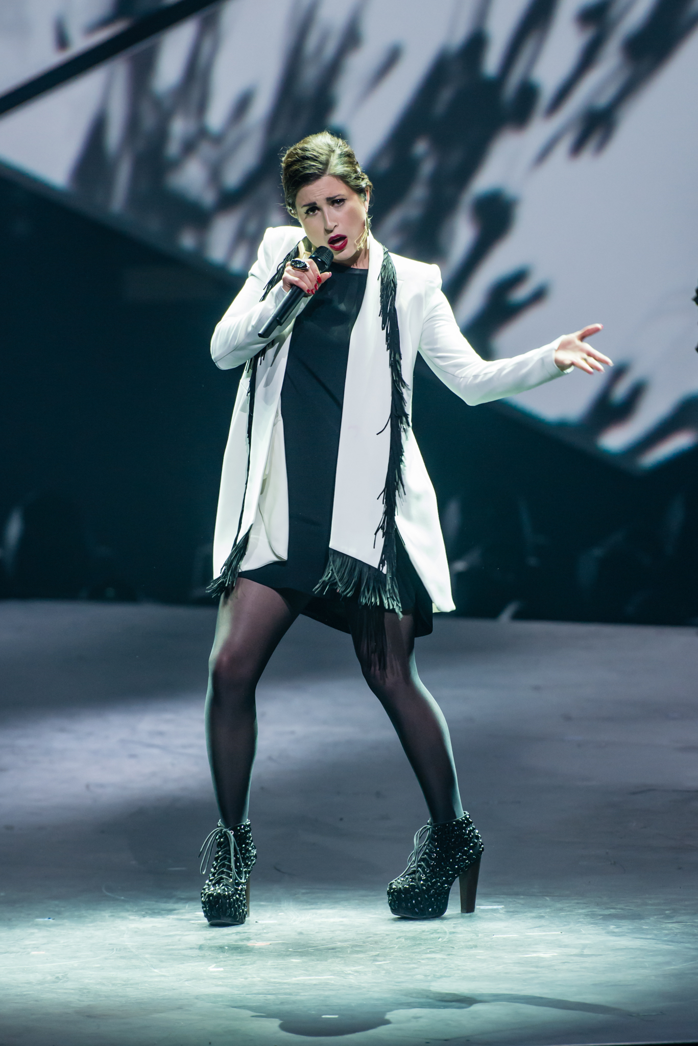 'Eurovision Song Contest 2015 - Unser Song für Österreich Live Show': 'Ann Sophie'